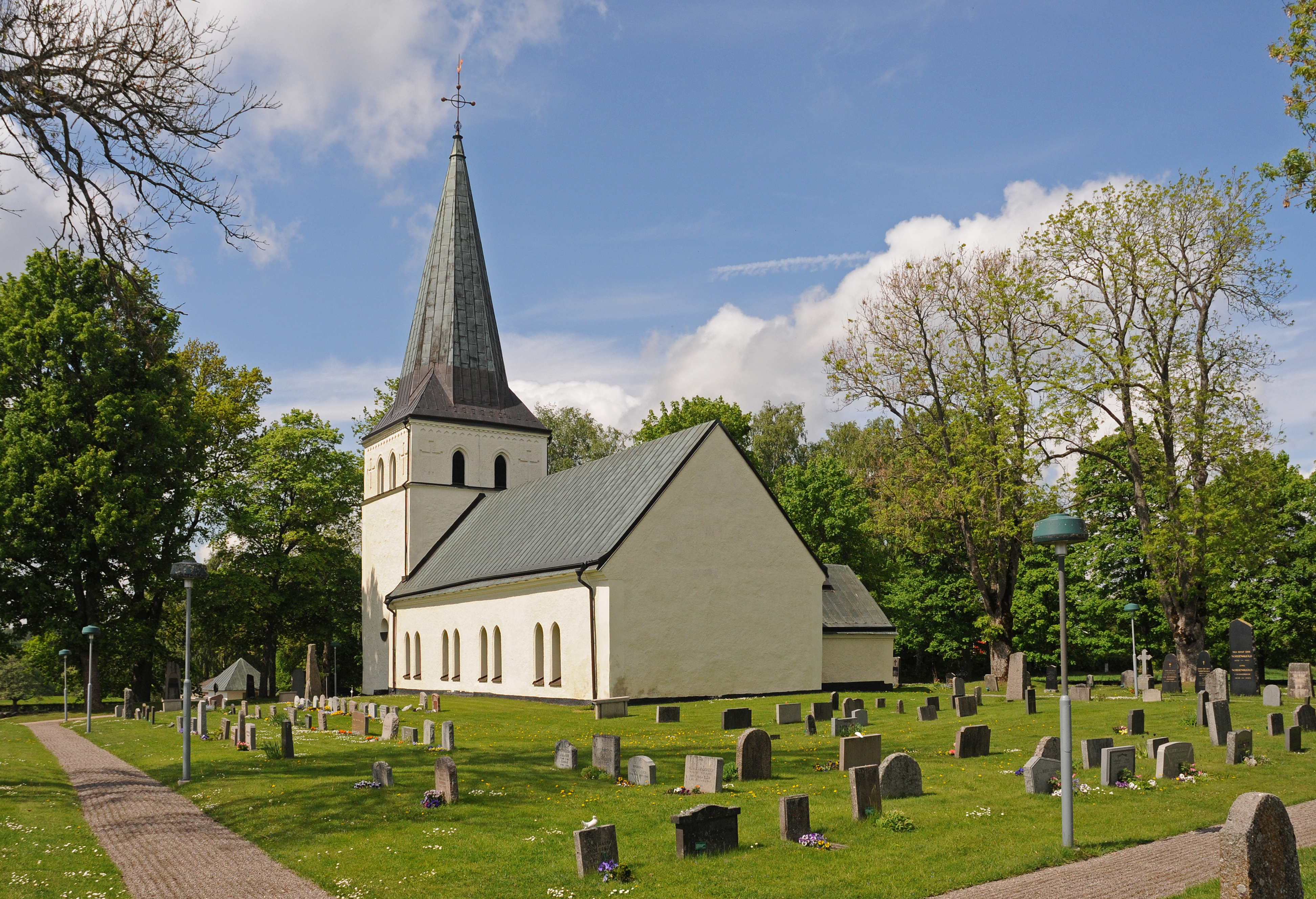 Västerljungs kyrka i Trosa kommun